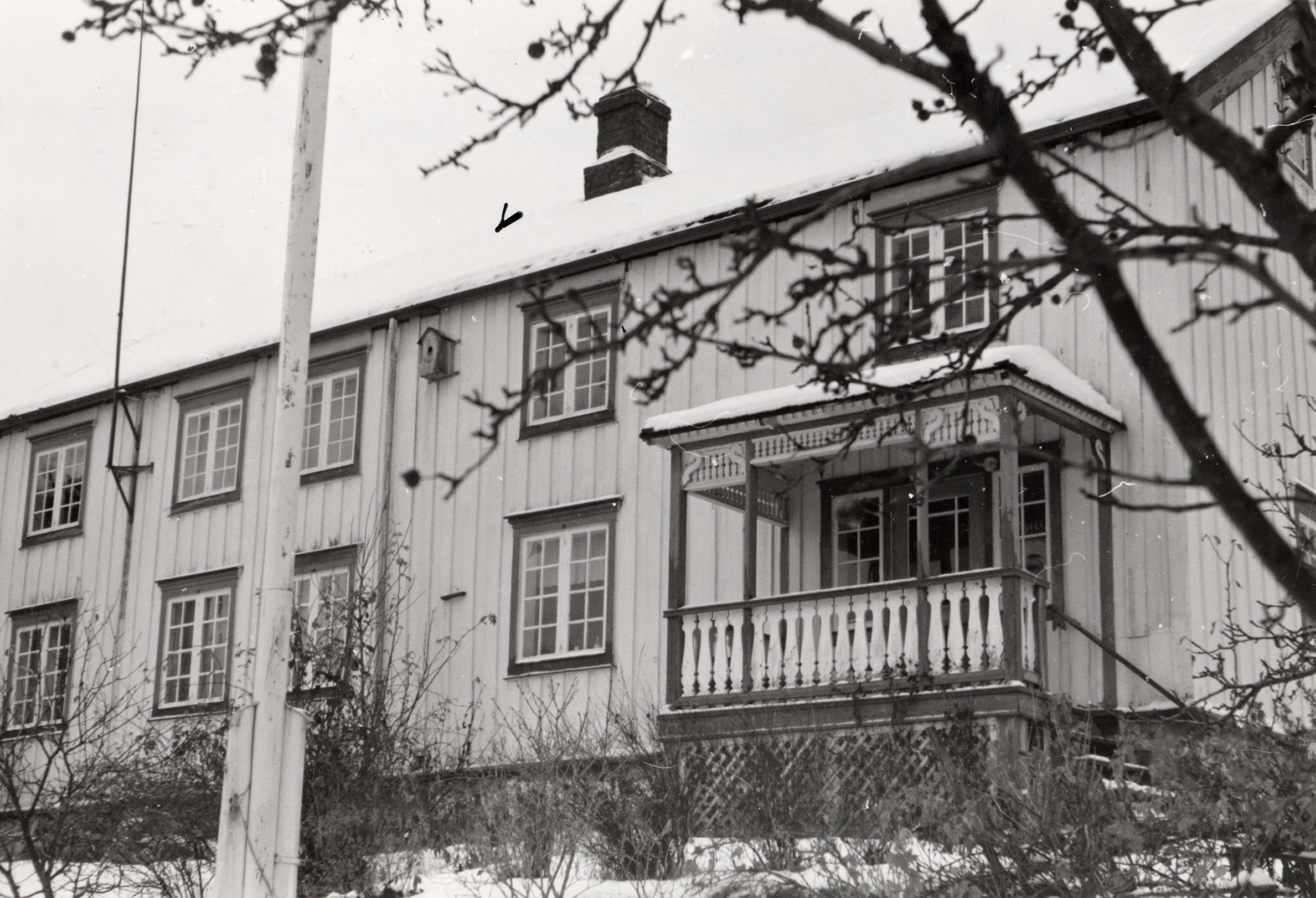 Vinjesjøen, Sæteråshuset i Mosvik, Nord-Trøndelag